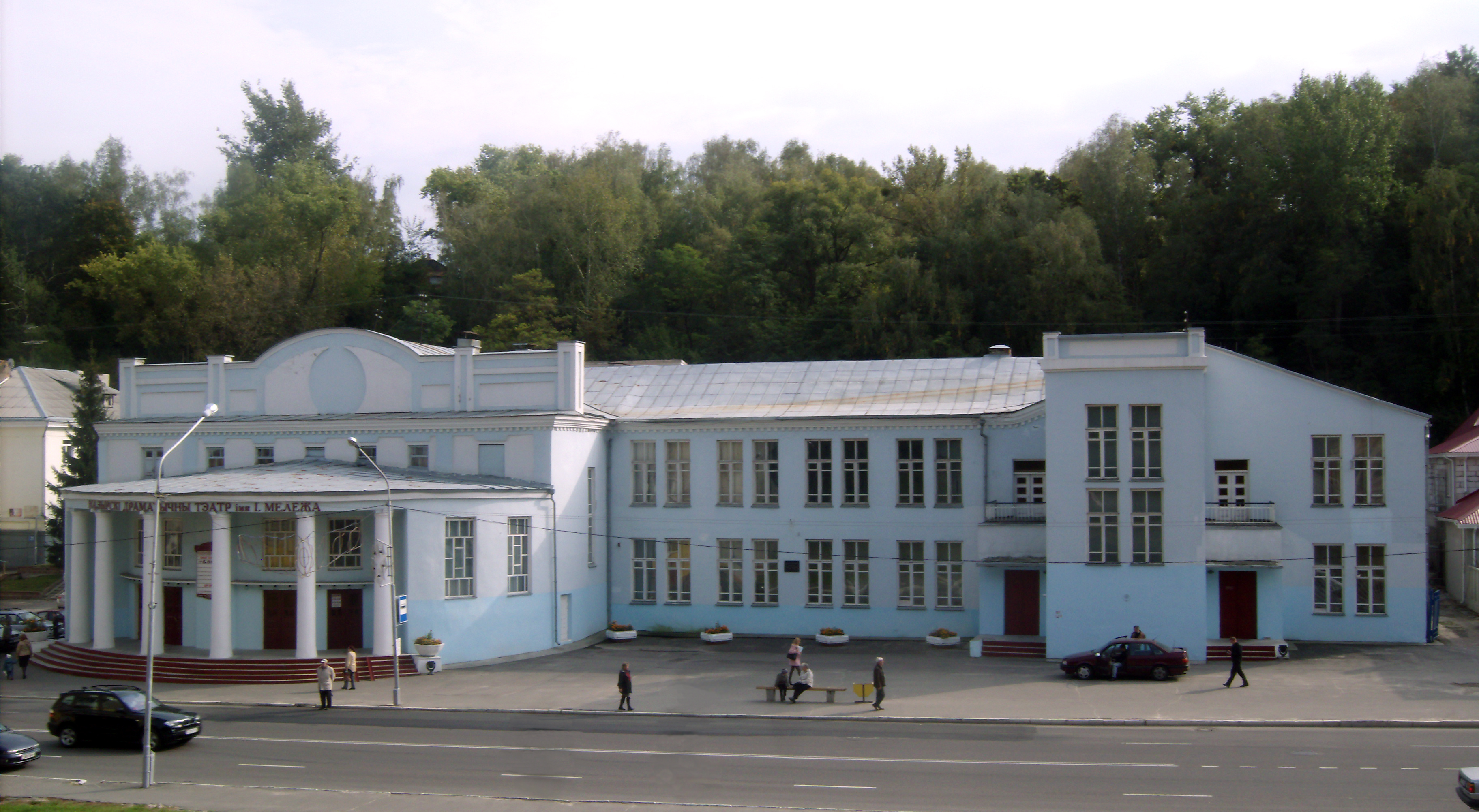 Будынак драматычнага тэатру. г. Мазыр This is a photo of Belarusian heritage monument. Reference number: 313Г000513 ( WLM)